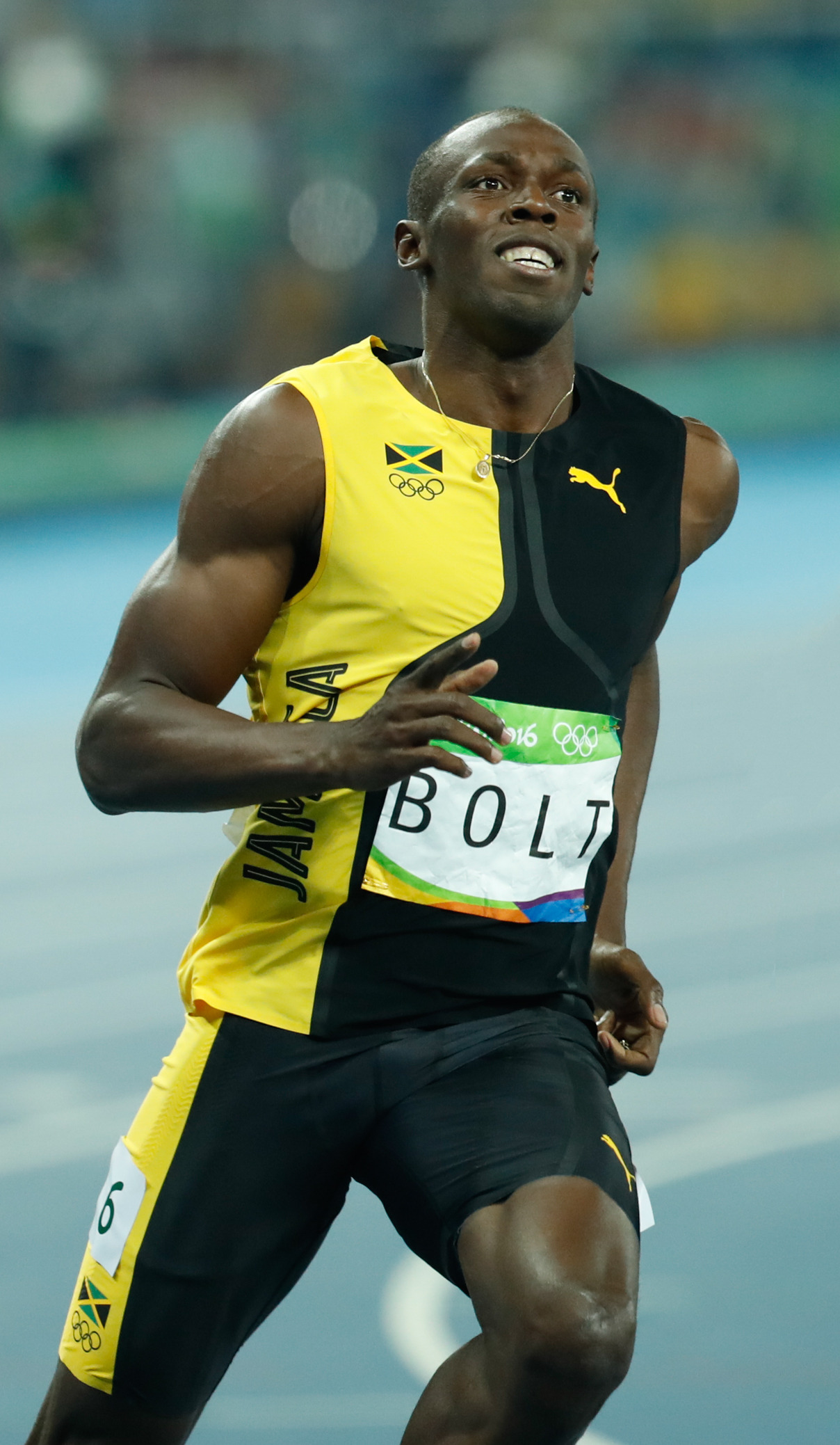 Rio de Janeiro - O jamaicano Usain Bolt, garantiu o ouro e fez história ao conquistar pela terceira vez o título de homem mais rápido do mundo nos 100 metros rasos em uma Olimpíada (Fernando Frazão/Agência Brasil).